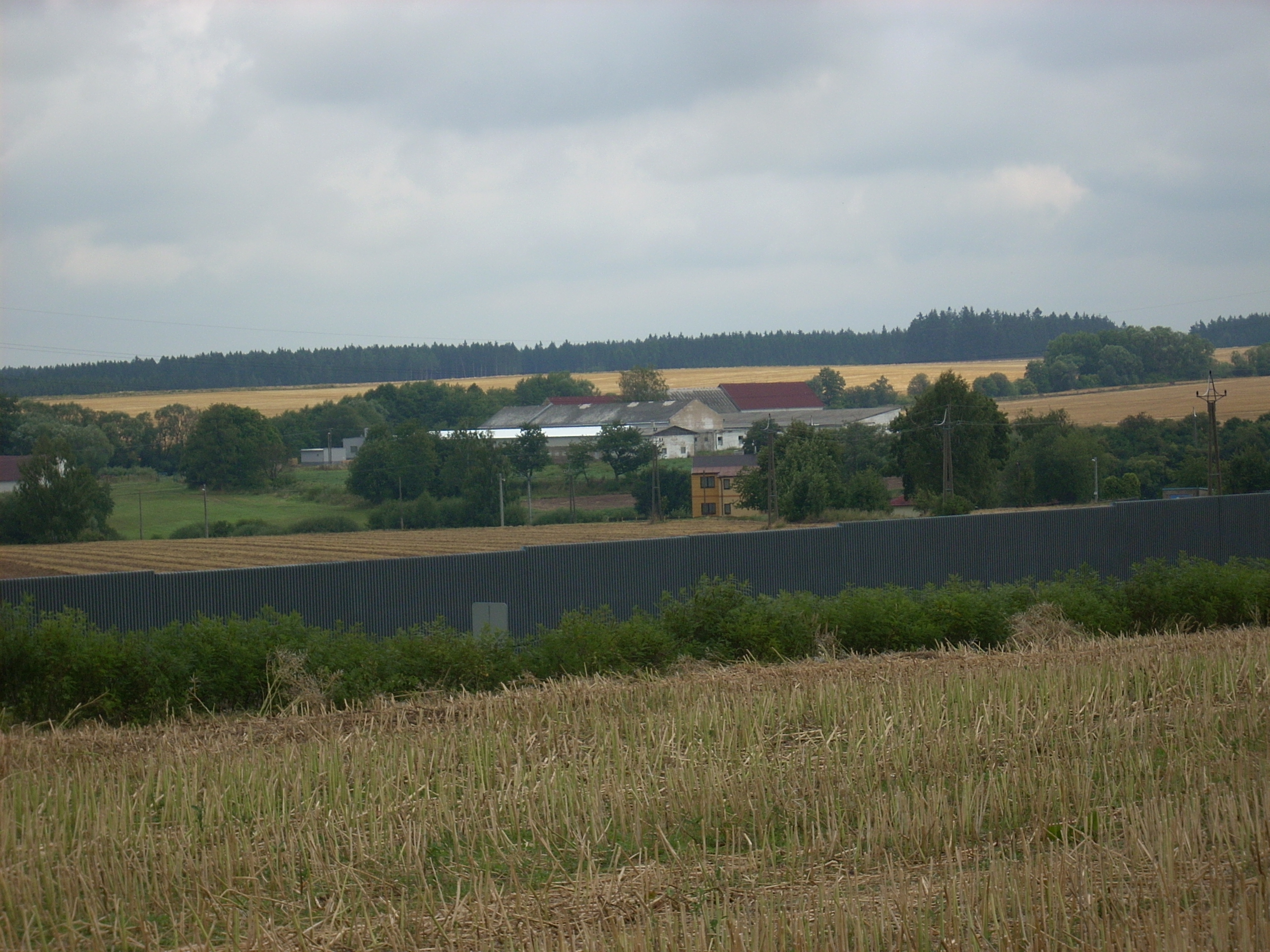 Měšín zemědělské budovy